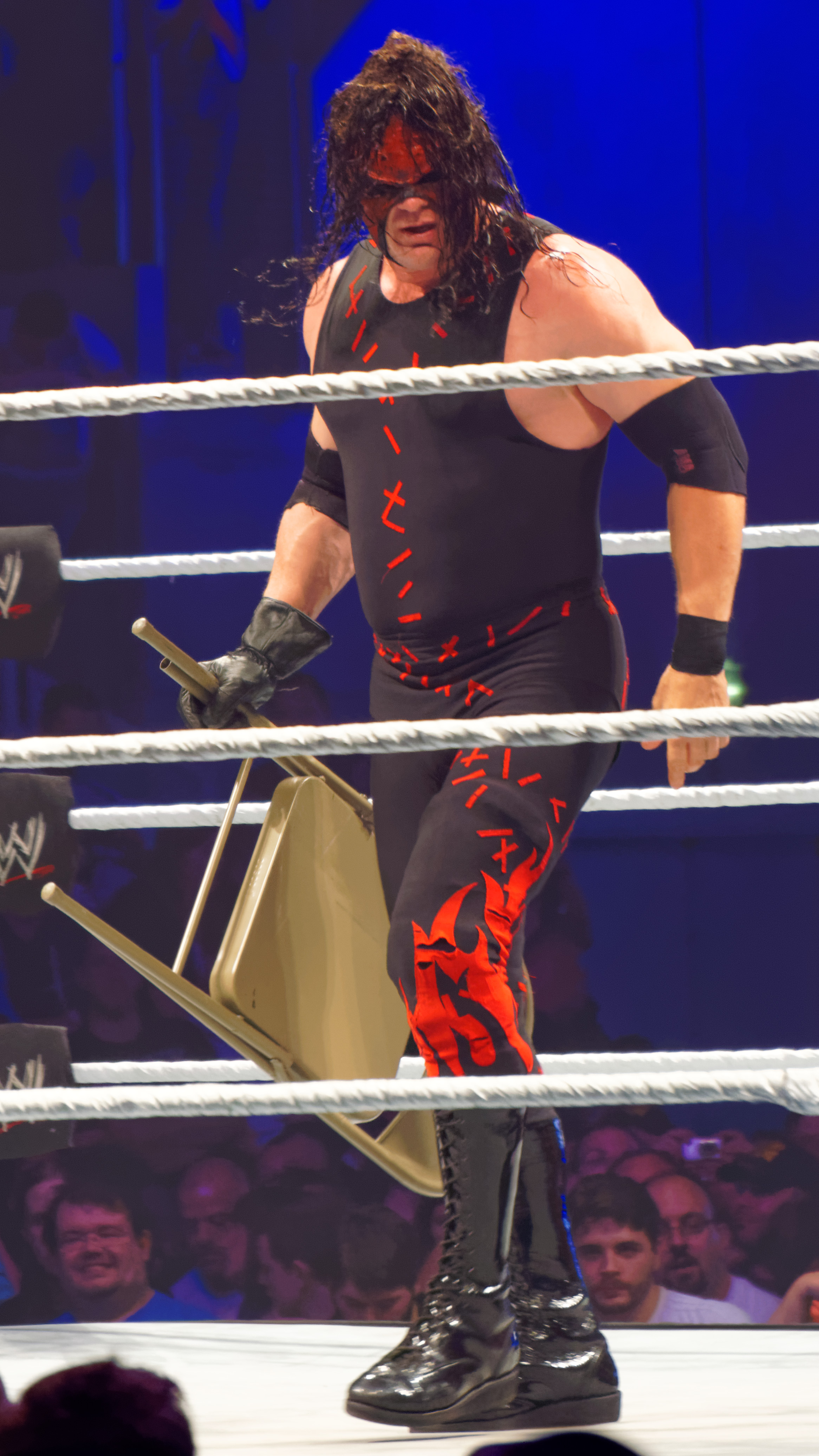 2014-05-22_20-57-25_ILCE-6000_1730_DxO